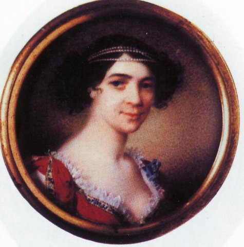 Варвара Ильинична Туркестанова